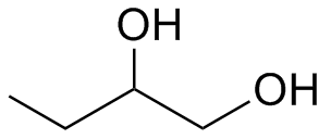 1,2-Butanediol